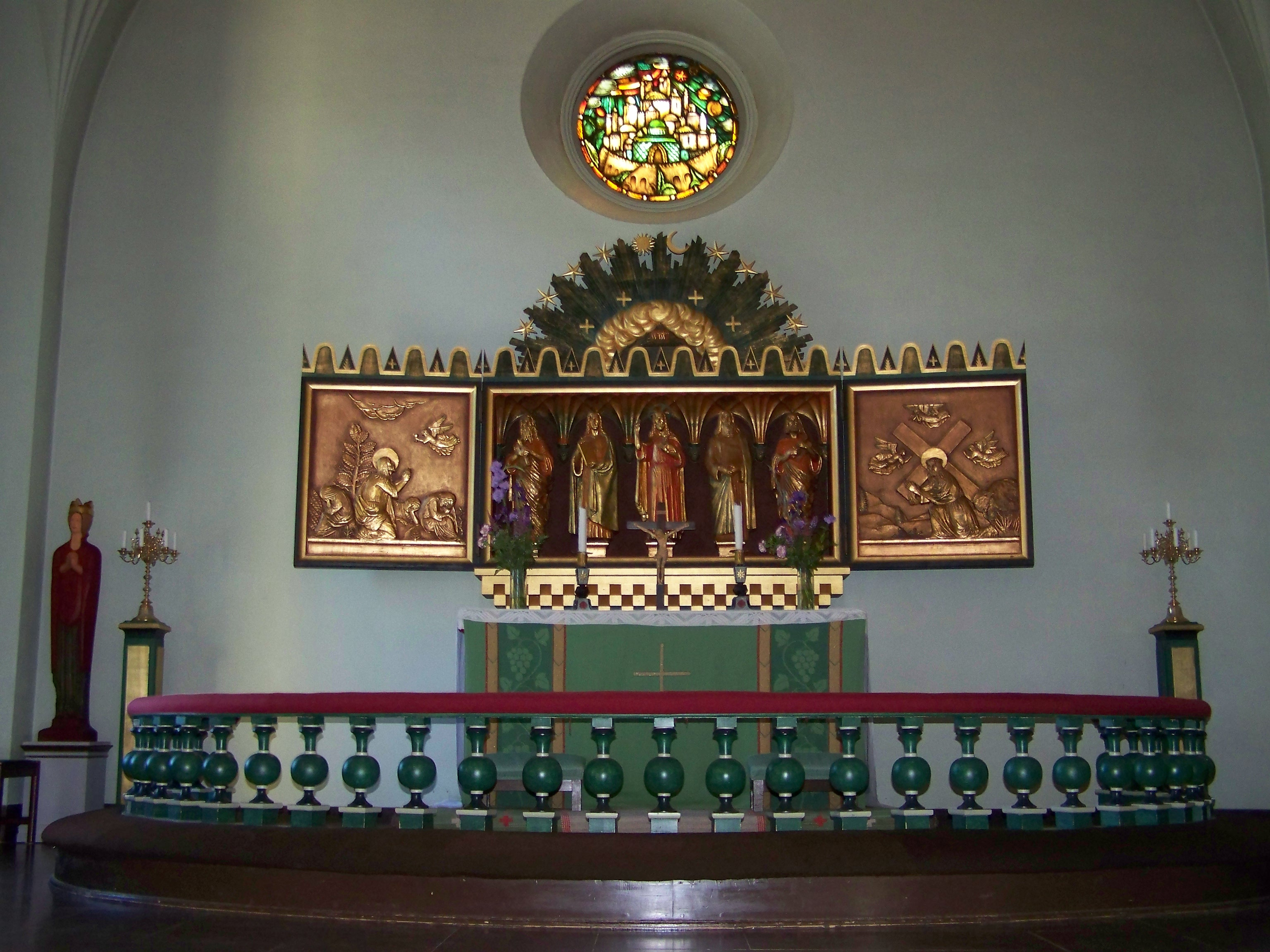 In Kallinge, Schweden. Kirche in Älmhult.